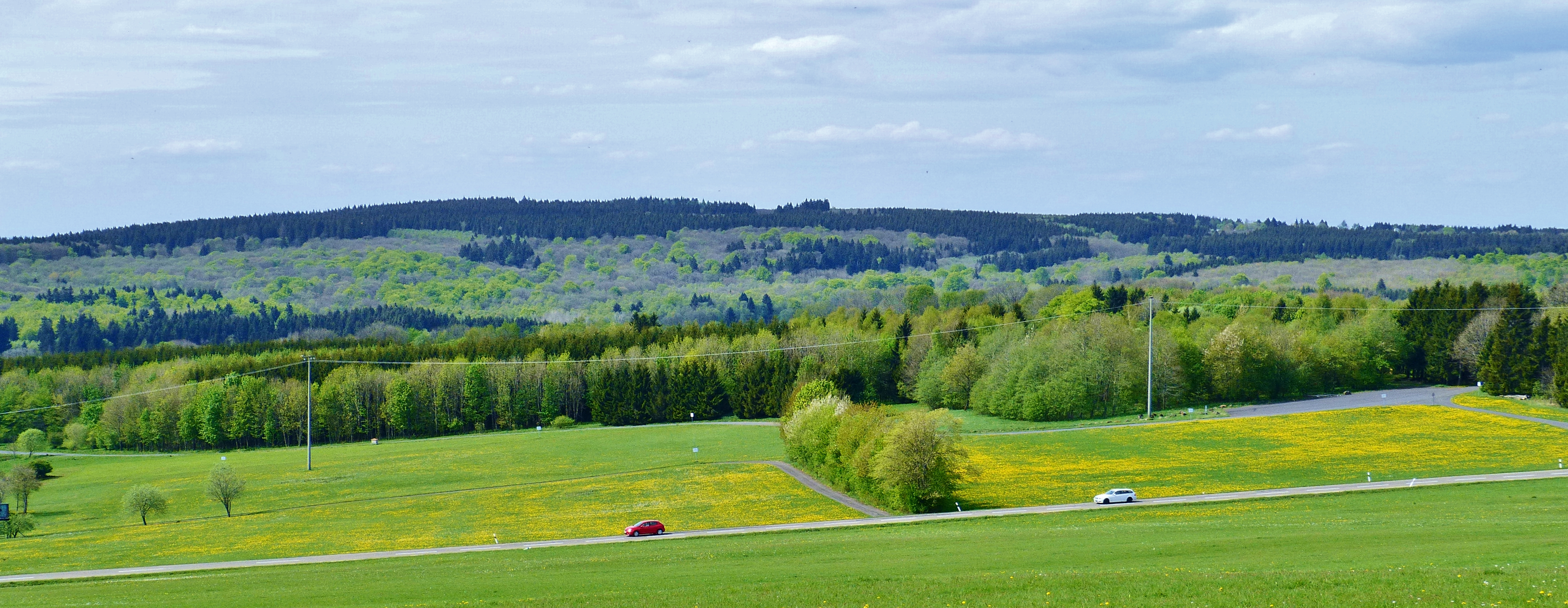 Der Stegskopf • Blick aus Südsüdost vom Galgenberg (über die Straße Stein - Hof hinweg) • Δ = 3,7 km; mrel = 1,4